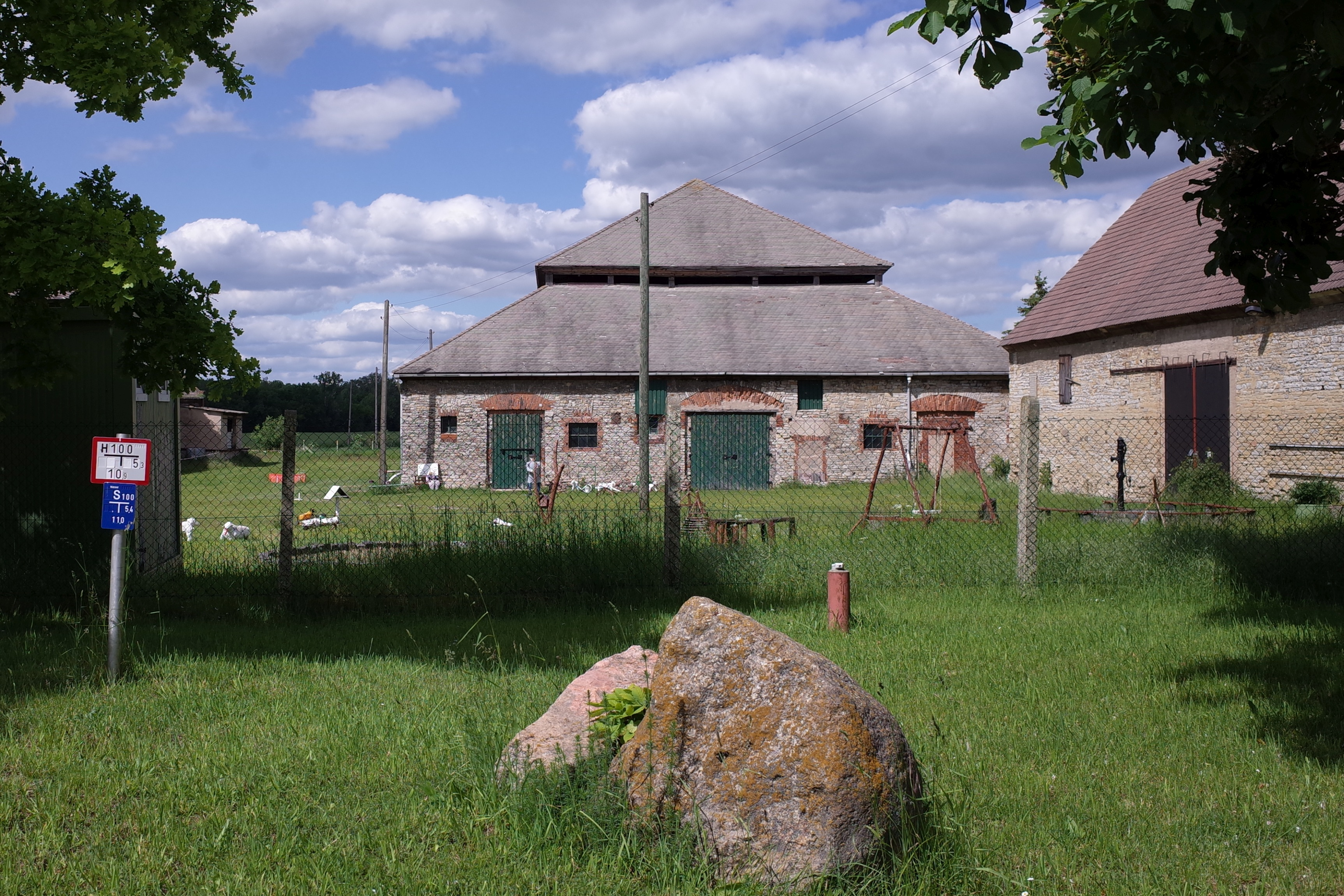 Nienburg (Saale), Ortsteil Grimschleben. Der 1827 von Christian Gottfried Heinrich Bandhauer erbaute Schafstall. Die Nummern können vertauscht sein.)